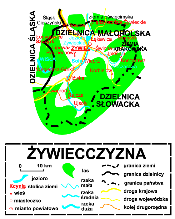 Syntetyczna mapa Żywiecczyzny